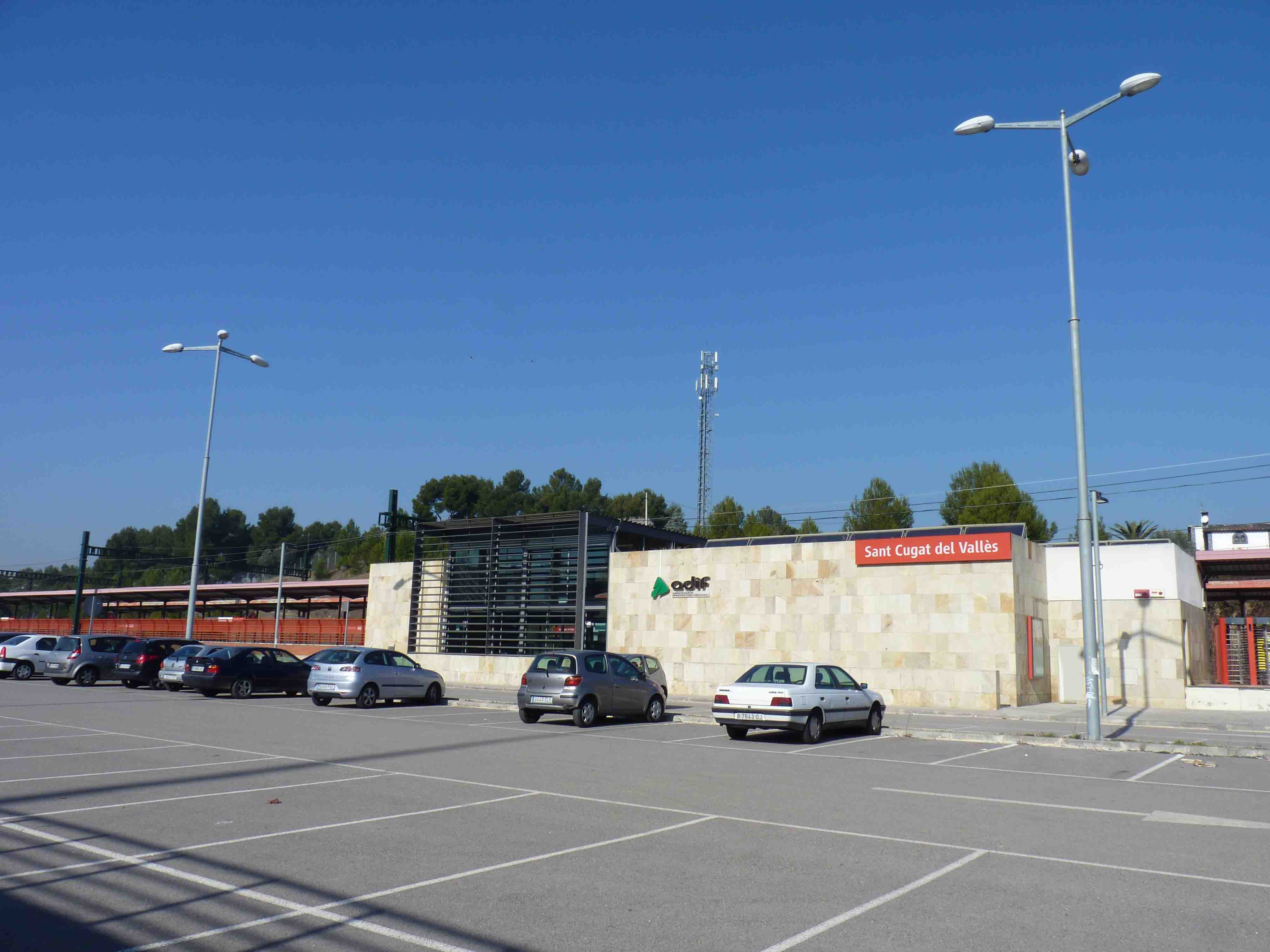 Façana de l'estació d'Adif a Sant Cugat del Vallès